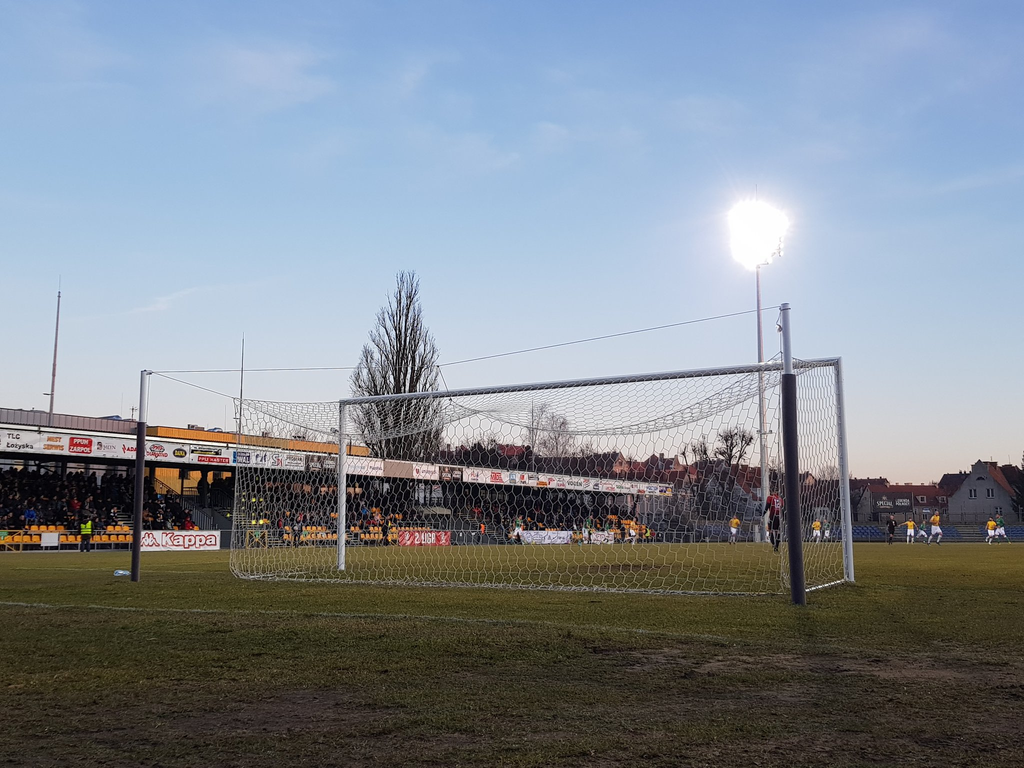 Oświetlenie na stadionie miejskim w Elblągu